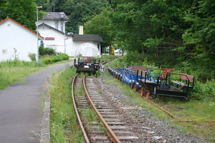 Malente-Gremsmühlen - Draisine